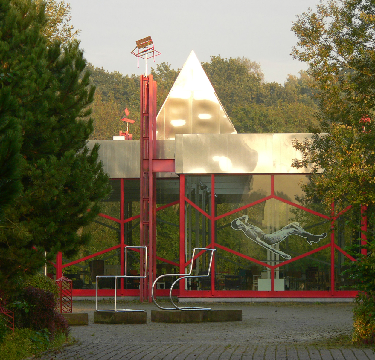 Fassade des Kragstuhlmuseums